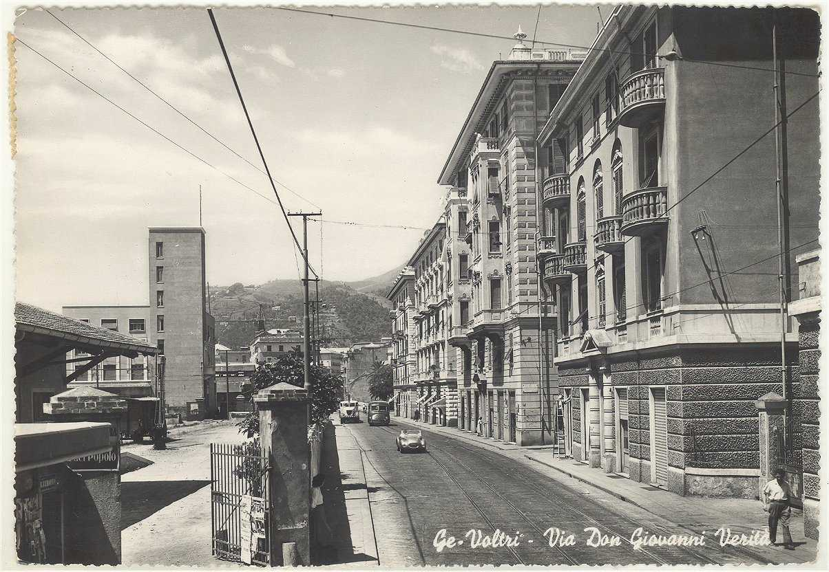 GE Voltri - via don Giovanni Verità